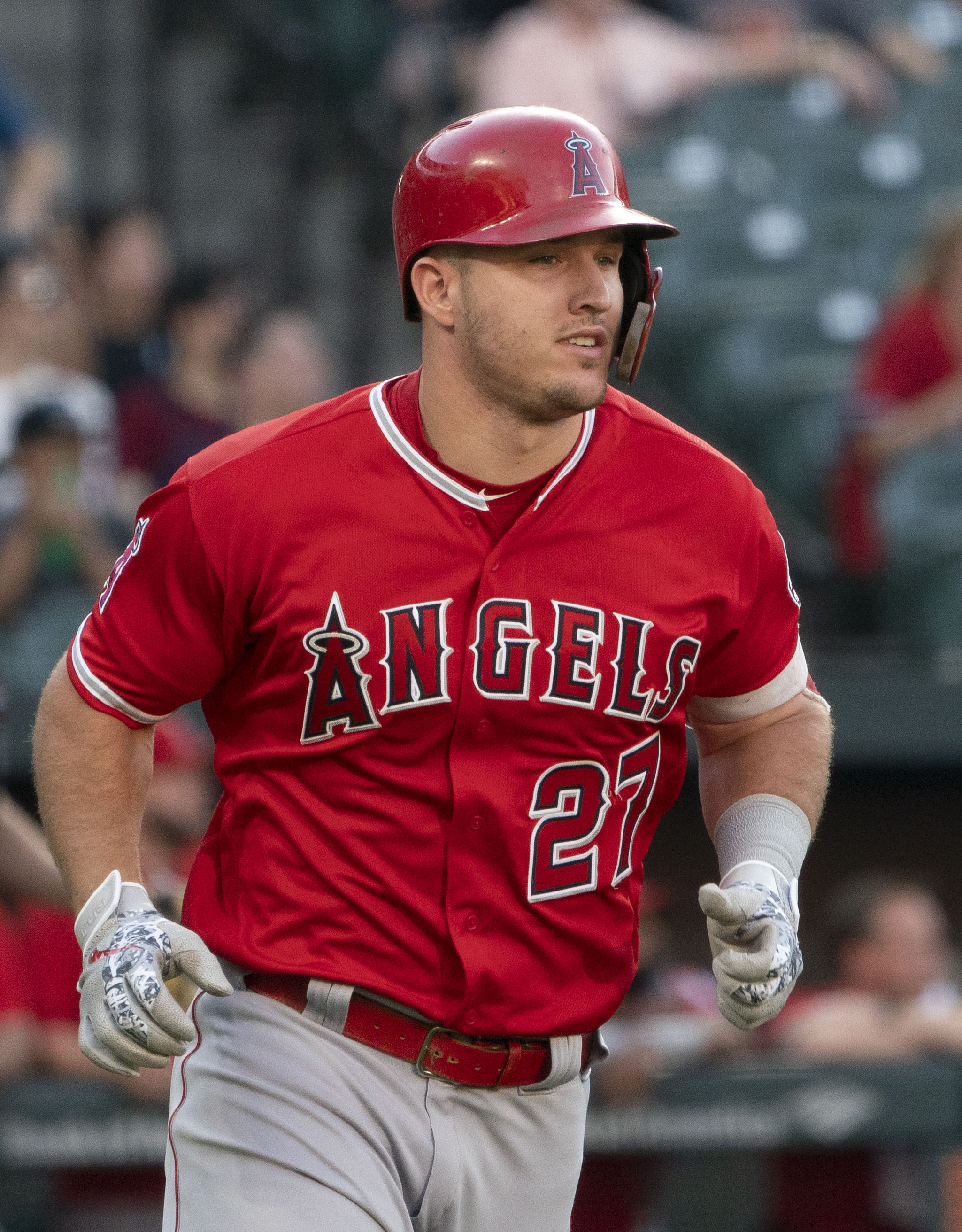 Angels at Orioles 6/29/18